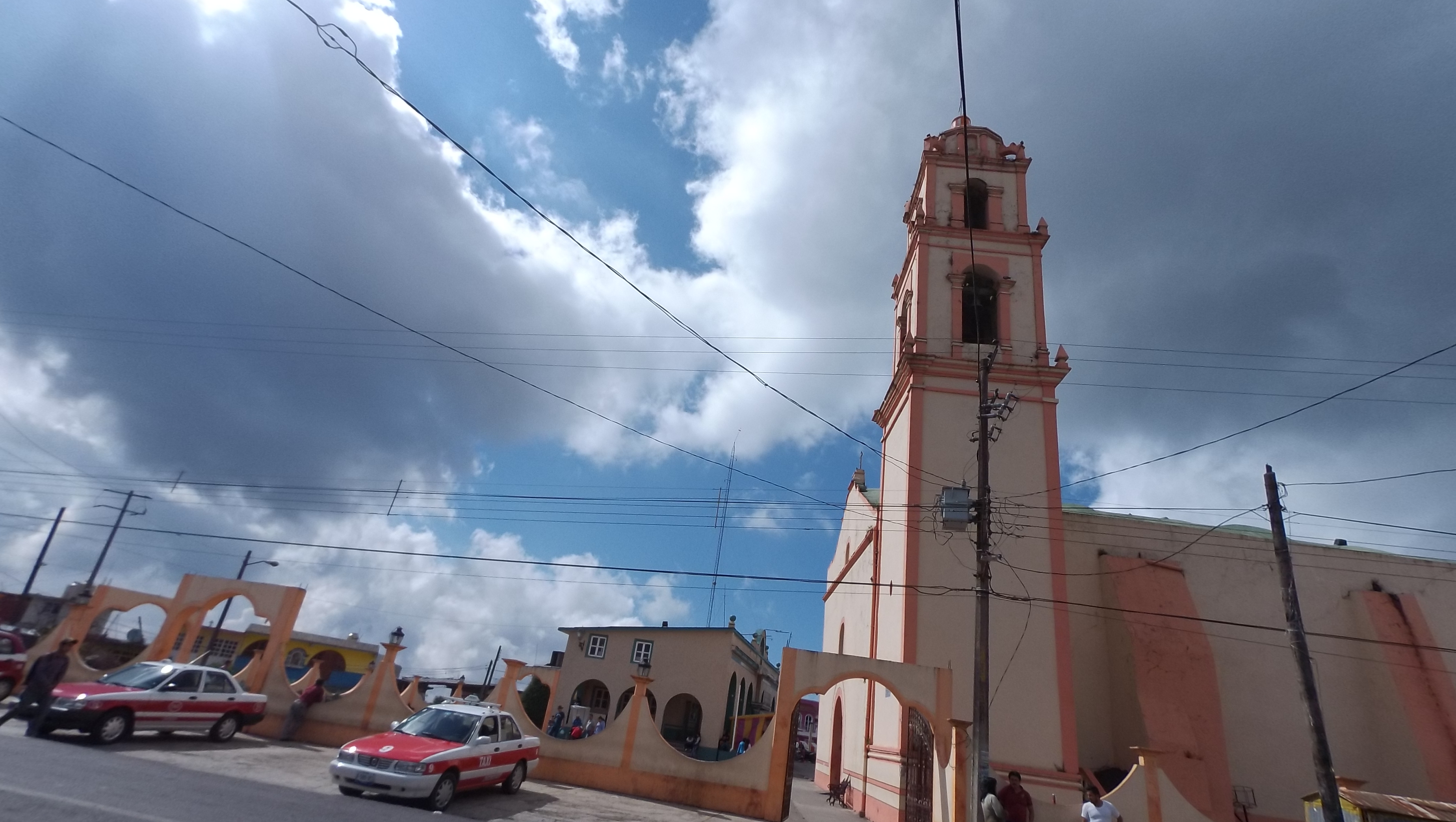 Fotografias de Chiconquiaco